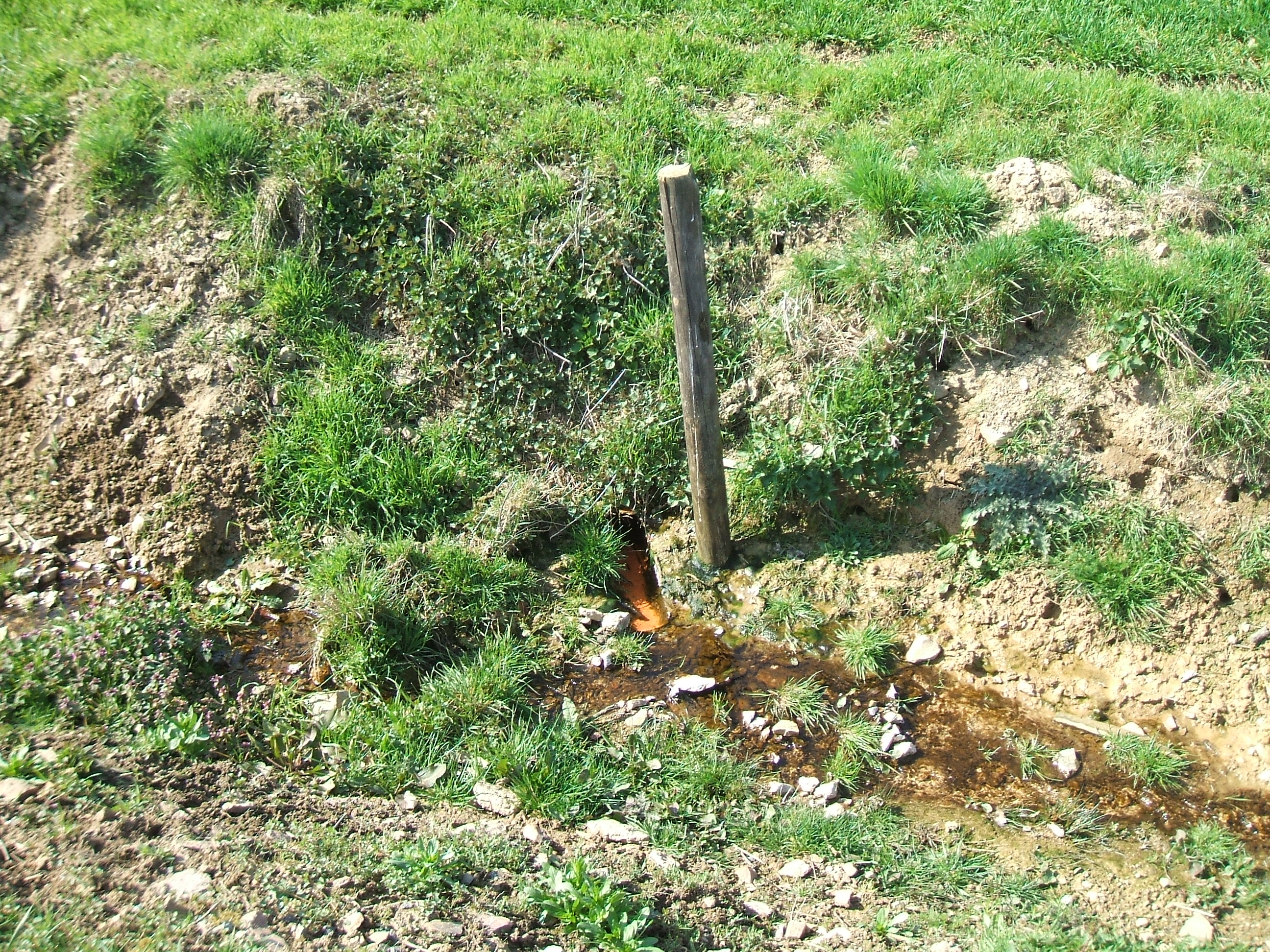 Der verrohrte Quellast des Deutergrabens vom Wald an der Autobahn/Rosbacher Straße mündet als Dränage in selbigen, markiert durch einen Pfahl oder Stecken